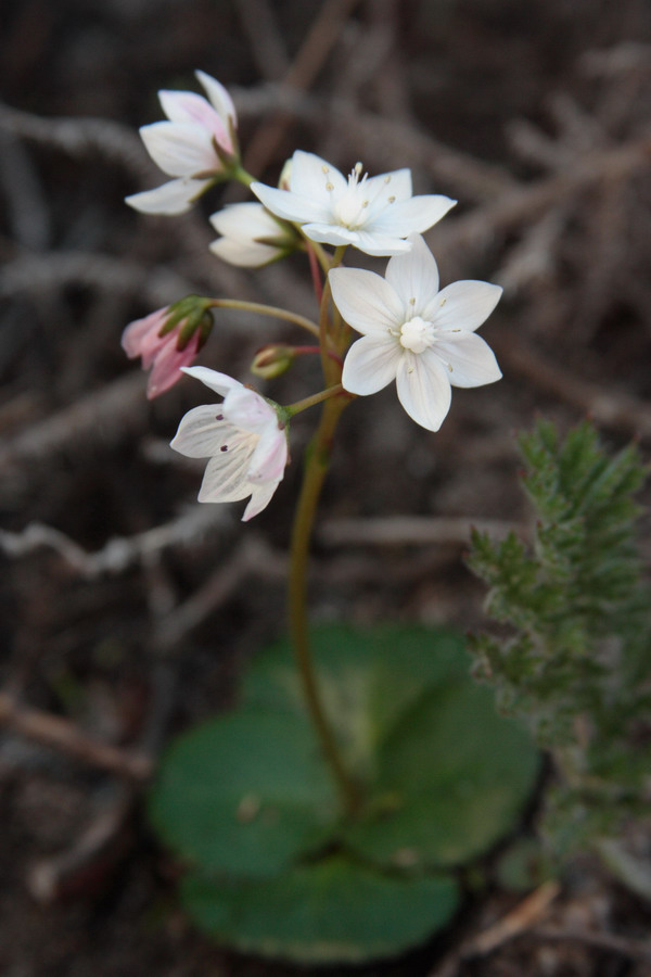 Crassula capensis (Cape Snowdrop)